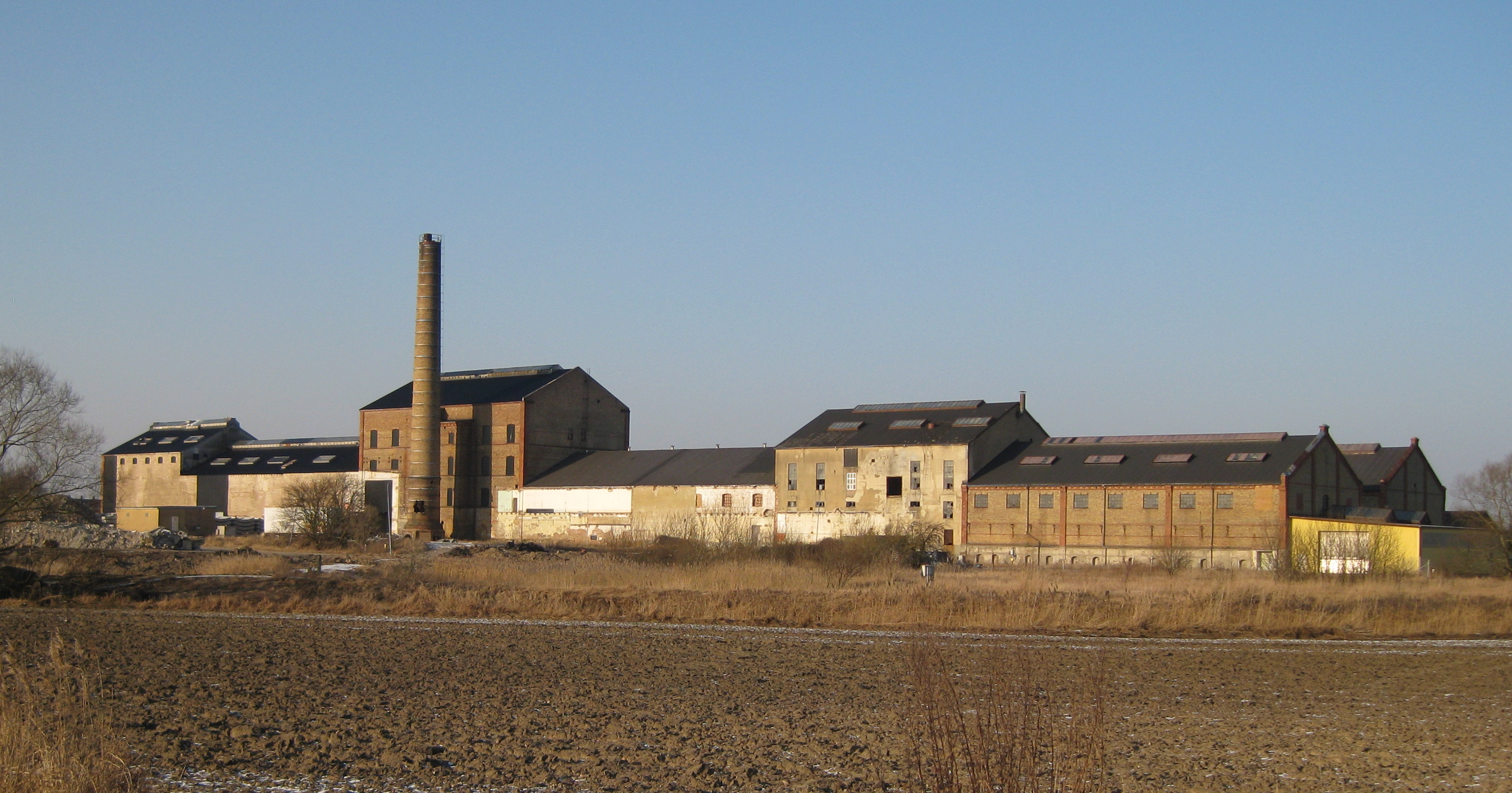 Det numera nedlagda sockerbruket i Hasslarp, Skåne